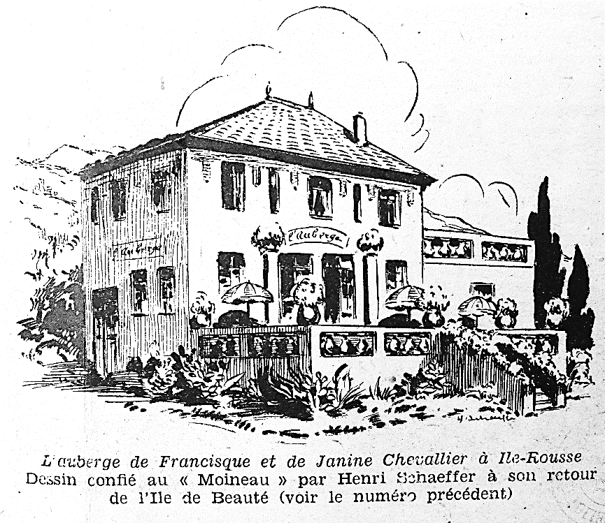 Auberge de la famille Chevallier à l'Ile-Rousse croquée par Henri Schaeffer lors de son voyage en 1951. Illustration dans "Le Moineau" retravaillée par Kévin Muret